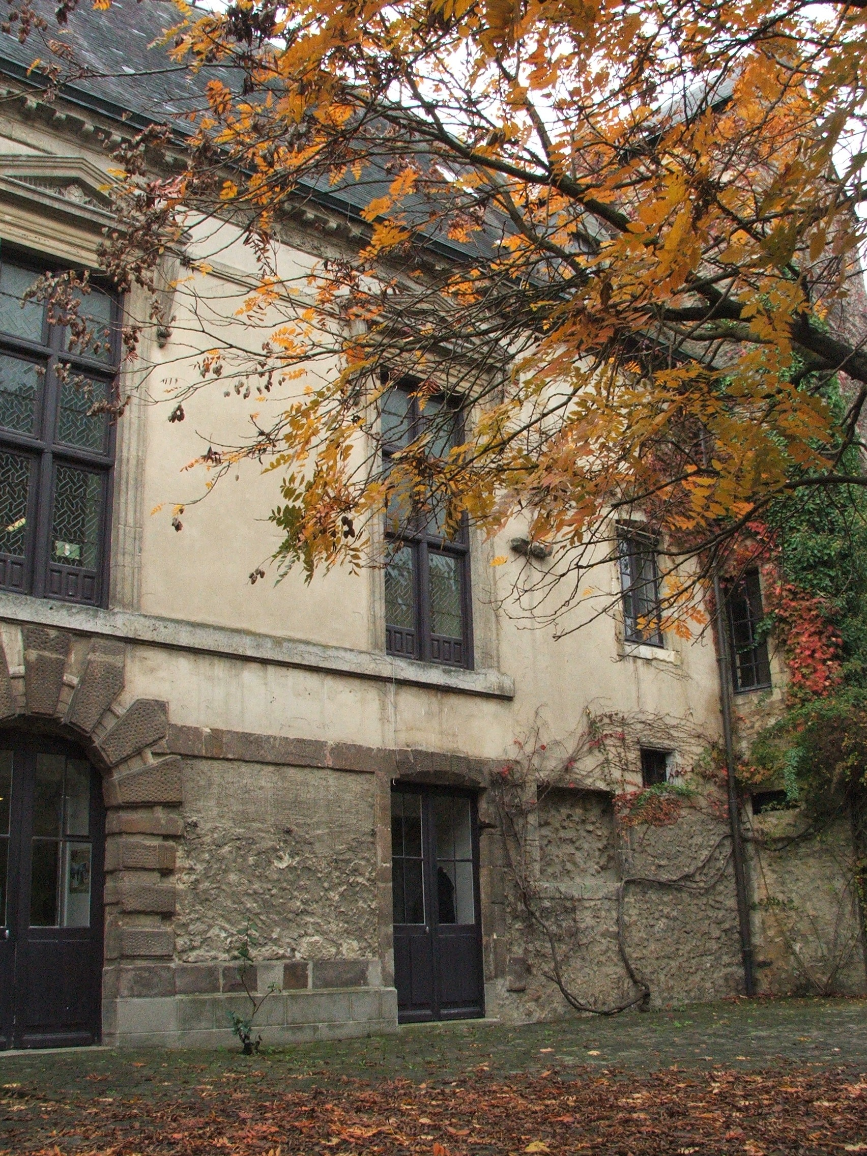 L'hôtel de Vignolles dans le Vieux-Mans datant du XVIe siècle, aujourd'hui direction du service spectacles de la ville.